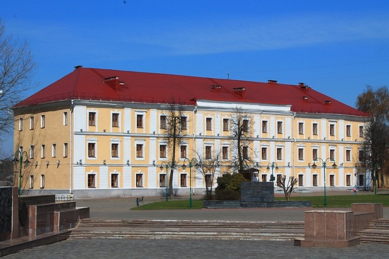 Акруговы суд. Магілёў